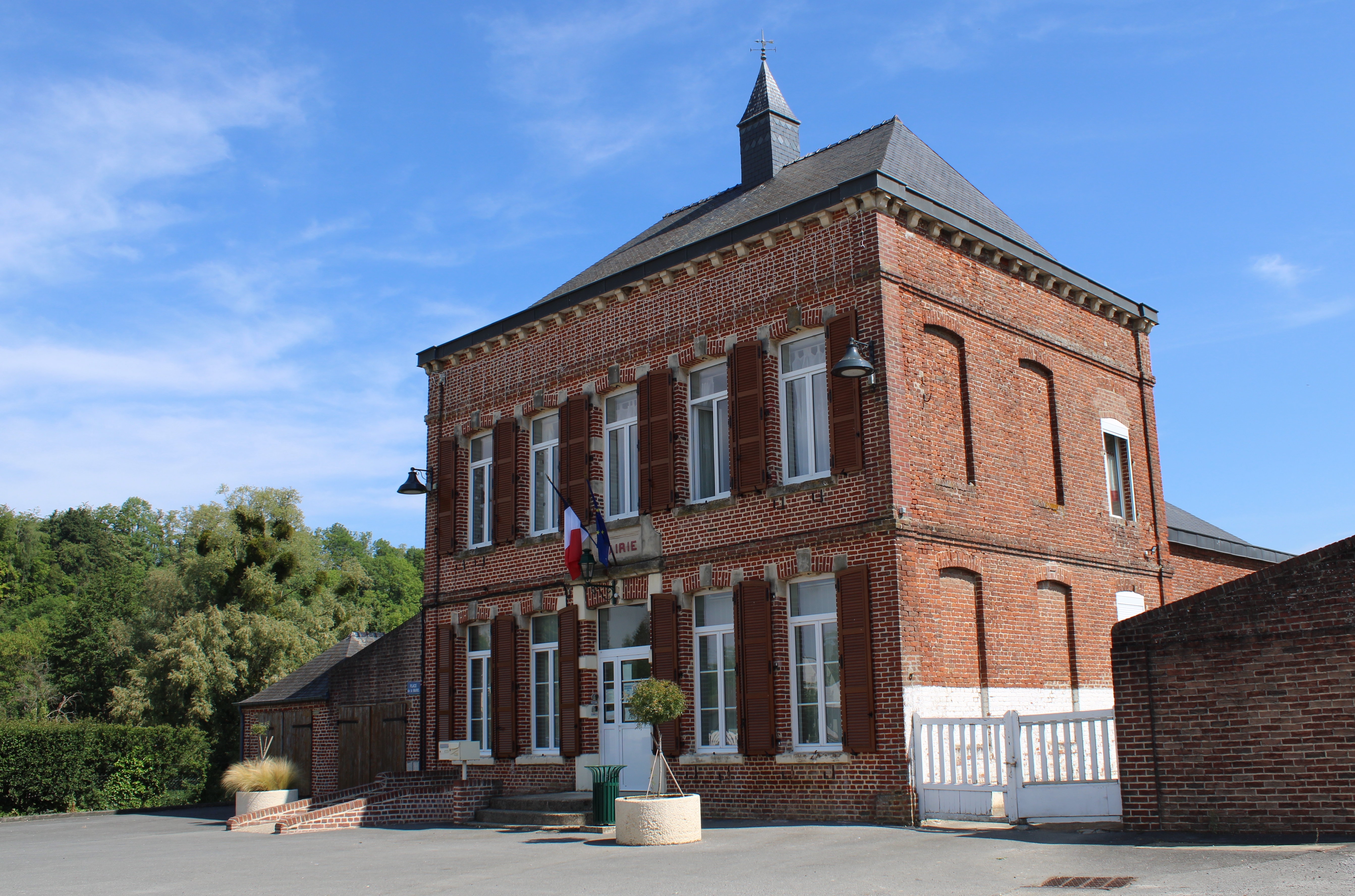 La mairie